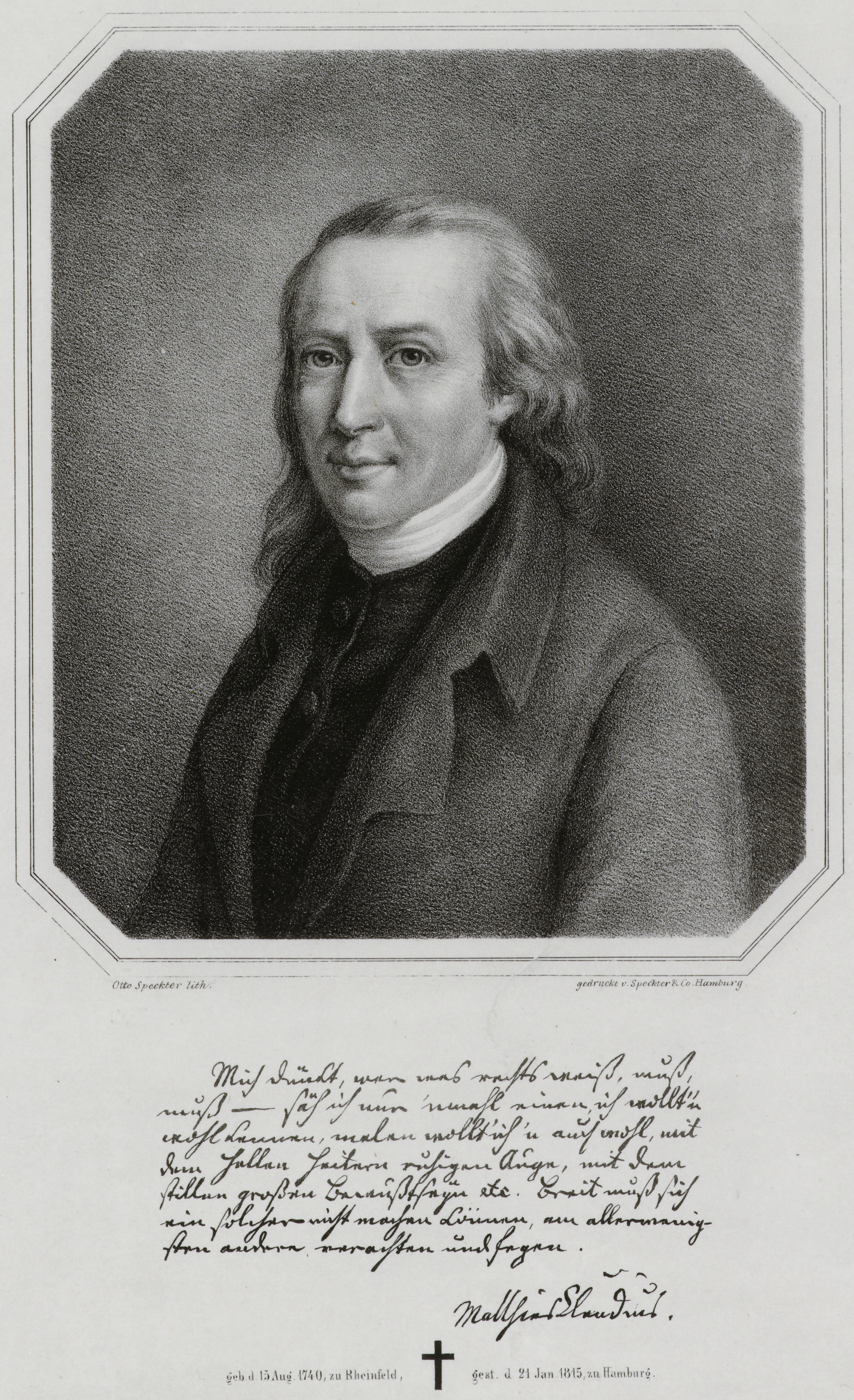 Bildnis von Matthias Claudius